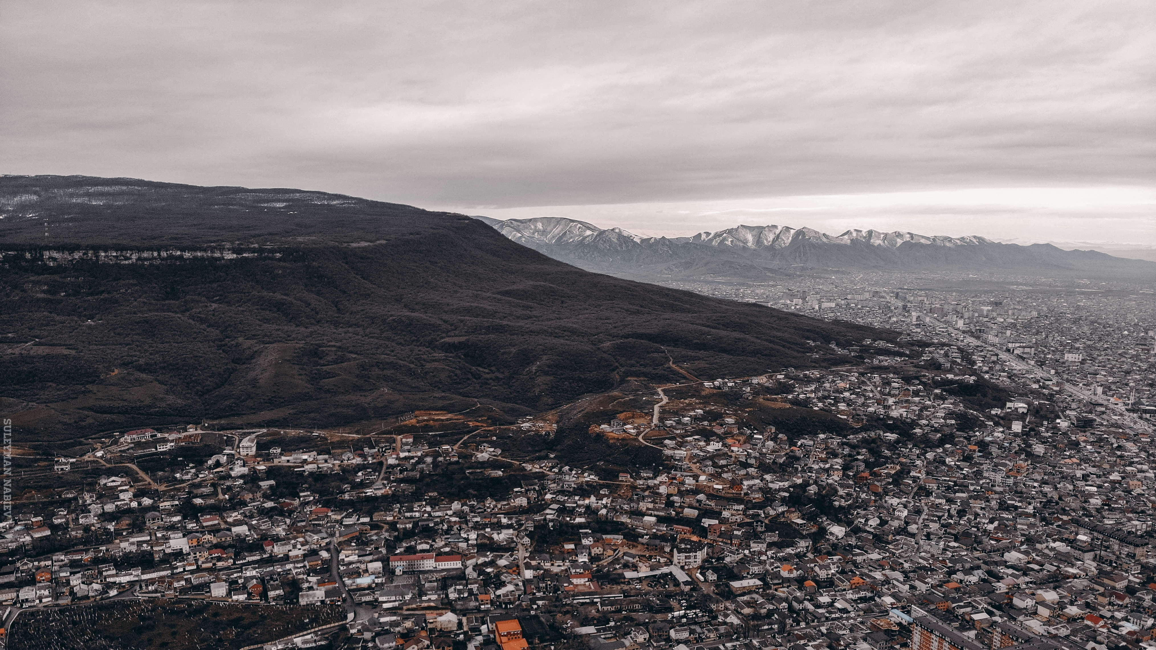 Тарки-Тау: район, Дагестан This image is related to the protected area of Russia number 0500052